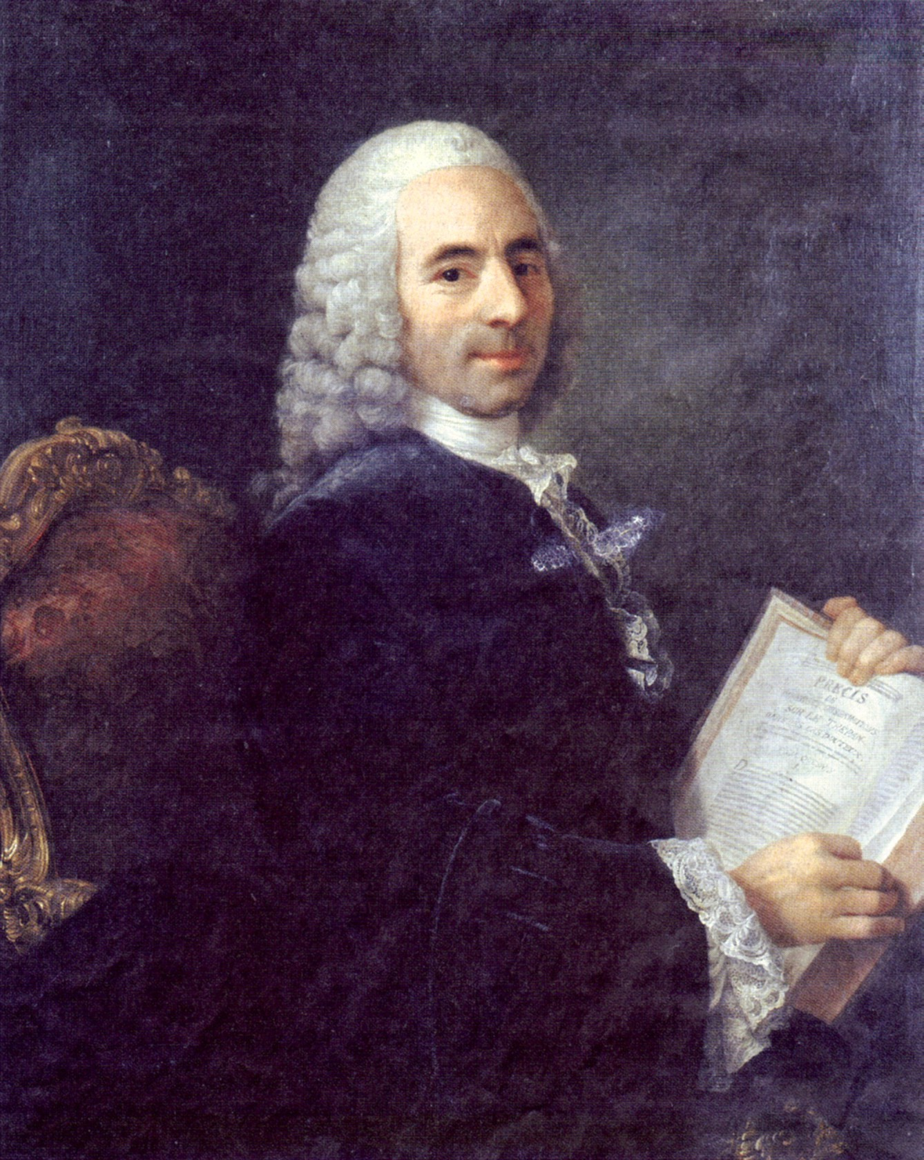 Portrait du docteur François Quesnay (1694-1774), médecin et économiste.